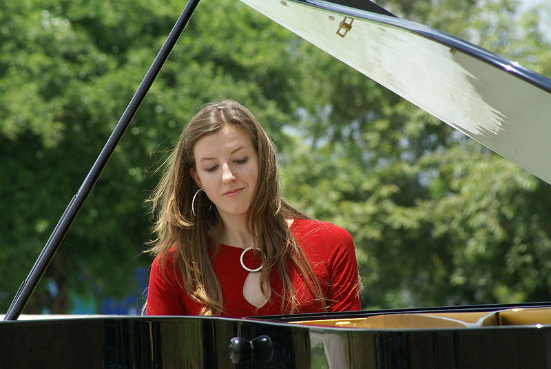 Fotografía de Enrique Chávez. Colima, 2008.